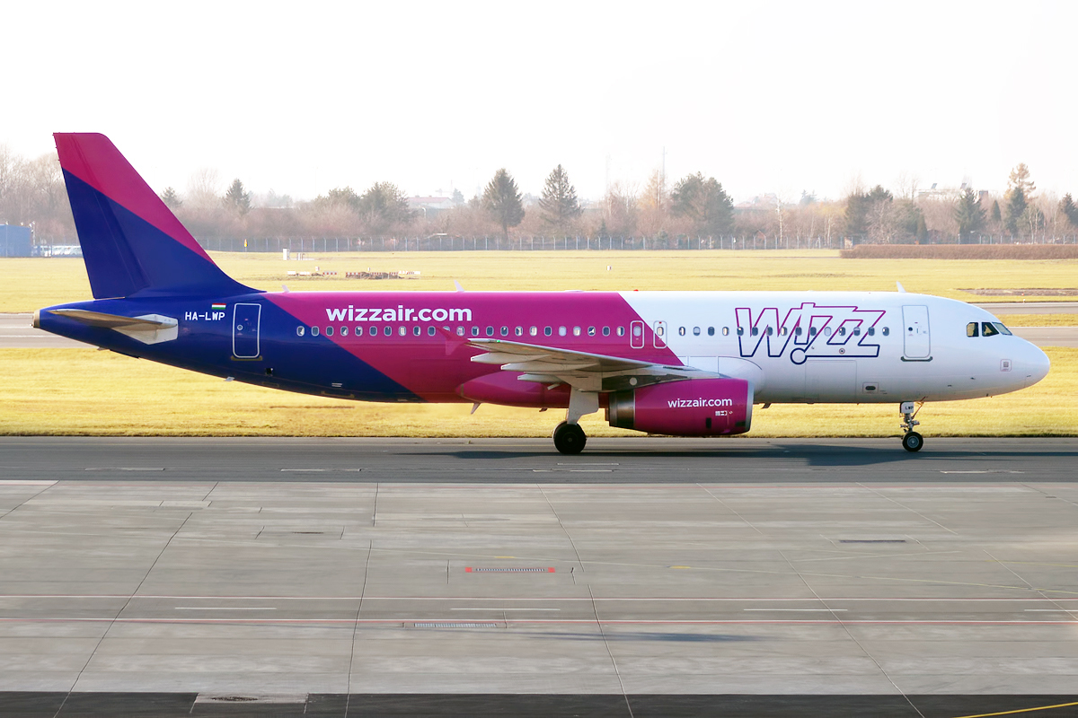 Wizz Air, HA-LWP, Airbus A320-232